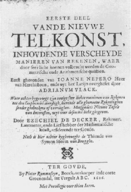 Ttitelpagina Van de Nieuwe Telkonst door Ezechiel de Decker en Adriaen Vlacq